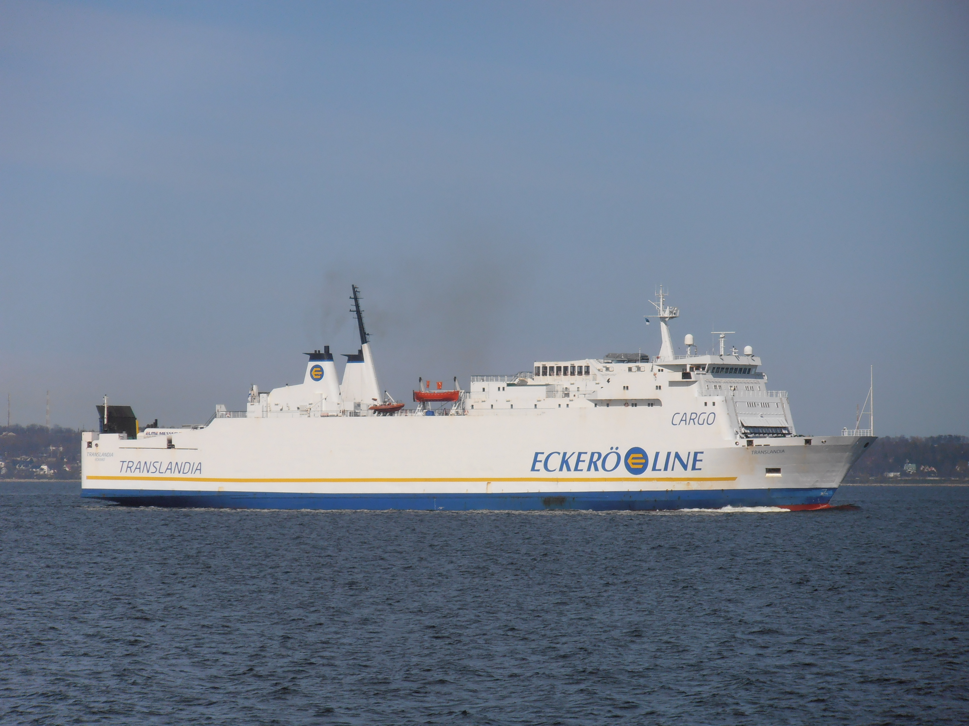 Translandia saabub Tallinna sadamasse 7. mail 2012